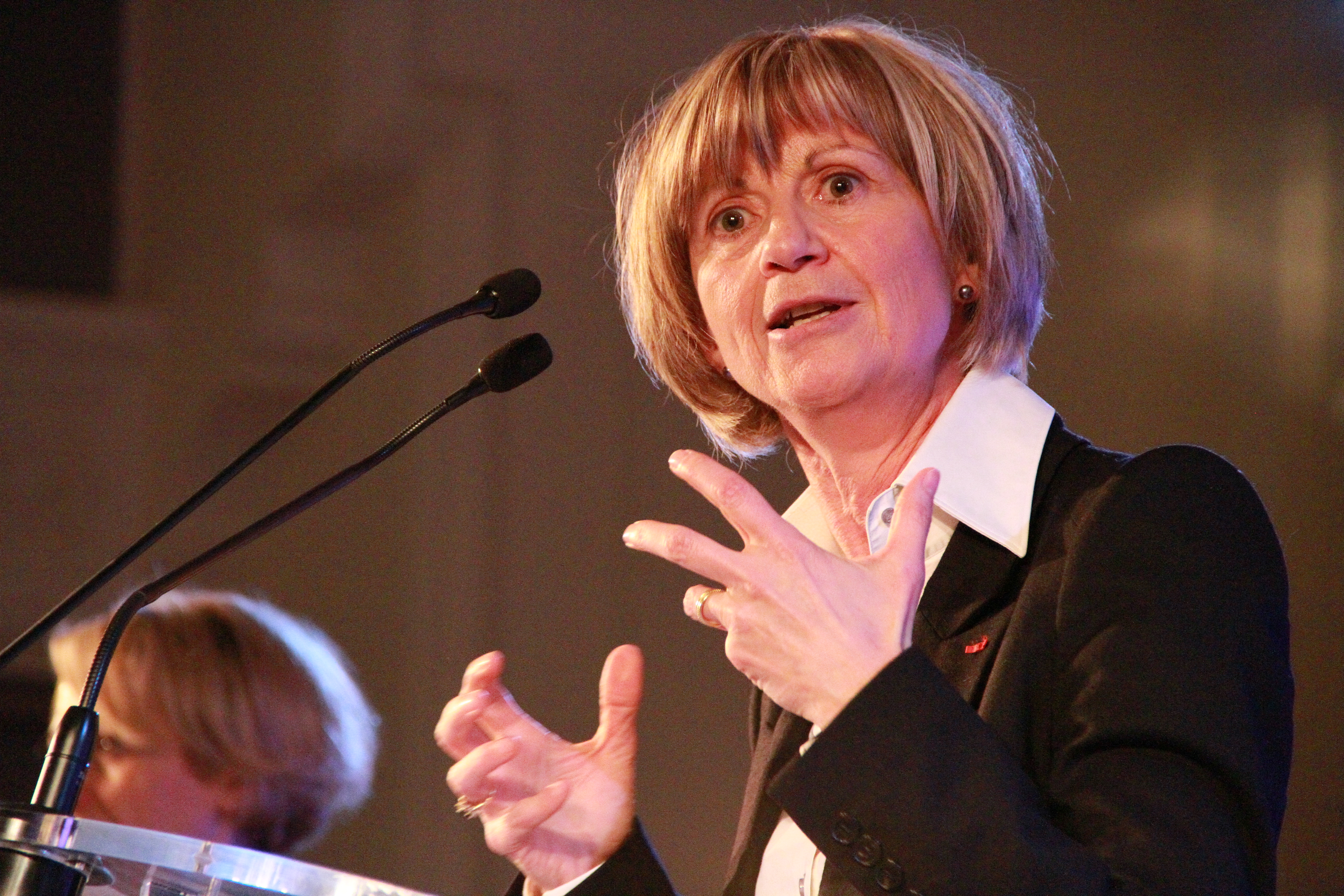 Armande le Pellec-Muller, recteur de l’Académie de Strasbourg au 3ème forum européen de bioéthique 28 janvier 2013